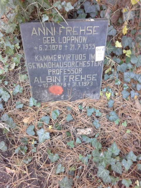 Grabplatte Albin Frehse und Gattin; Südfriedhof Leipzig XVII. Abteilung; Grabstelle aufgelassen